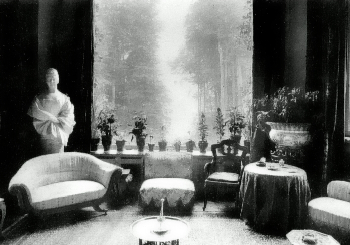 Salon, Schloss Wiligrad, Sichtachse zum Schweriner See